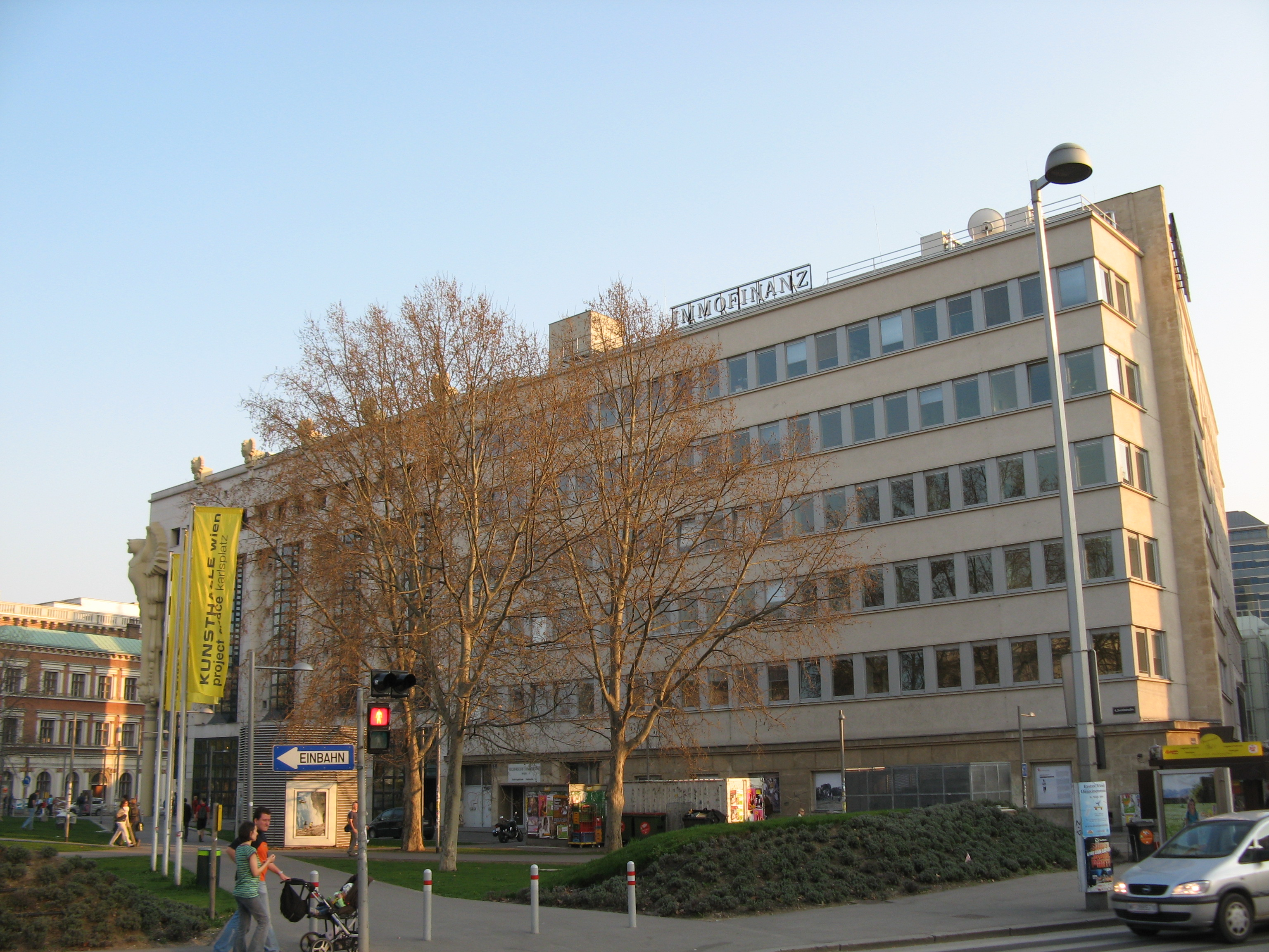 Ehemaliges Gewerkschaftshaus, genannt Porrhaus (1930-31) von Fritz Judtmann und Egon Riss, Operngasse 9, Wien-Wieden